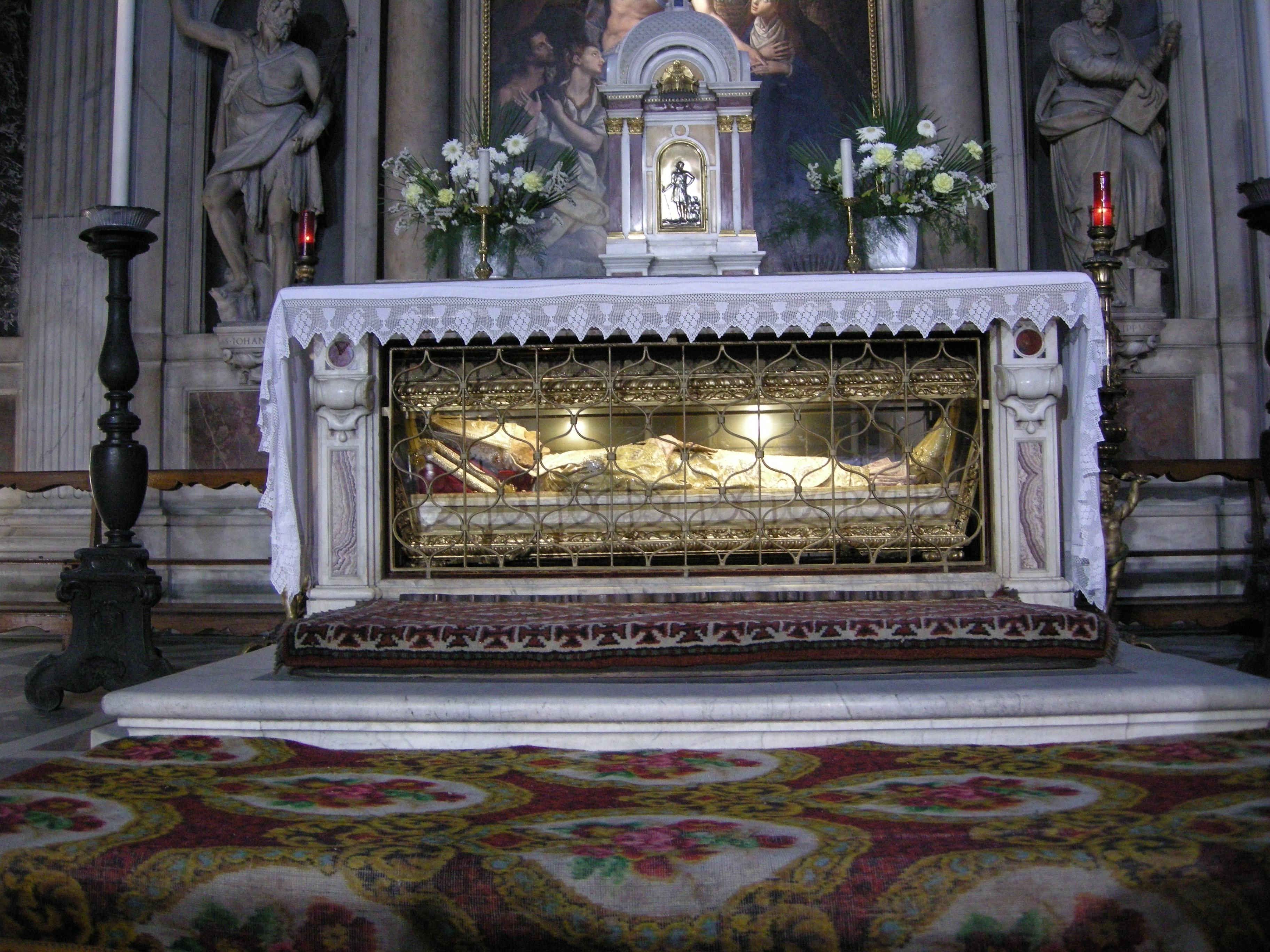 San marco, firenze, cappella salviati, altare2